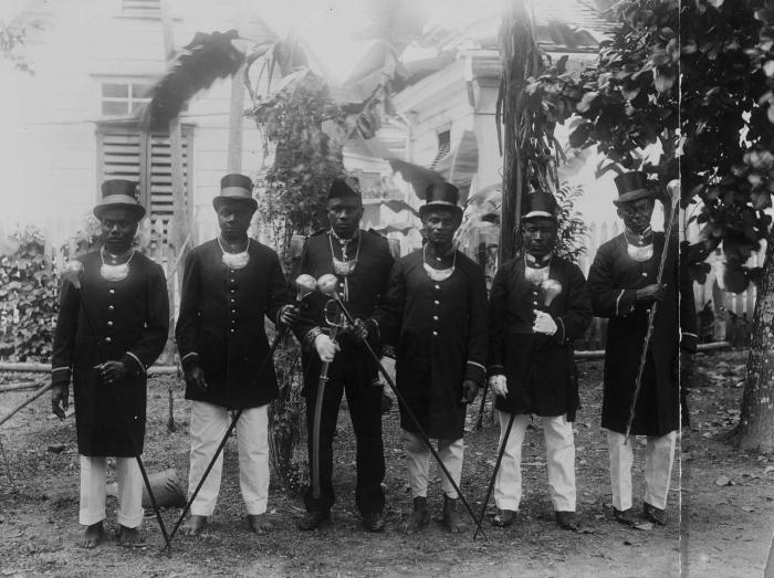 Foto. Jankoeso was een Granman van de Saramakaners. Alle mannen dragen hier een ceremoniële staf die bij hun functie hoort. Er wordt verteld dat Jankoeso (1898- 1932) een eind aan zijn leven heeft gemaakt naar aanleiding van spanningen met het lokale en nationale bestuur.. Portret van Granman Jankoeso met een aantal van zijn kapiteins